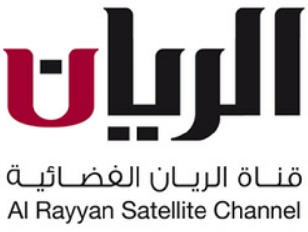 شعار القناة